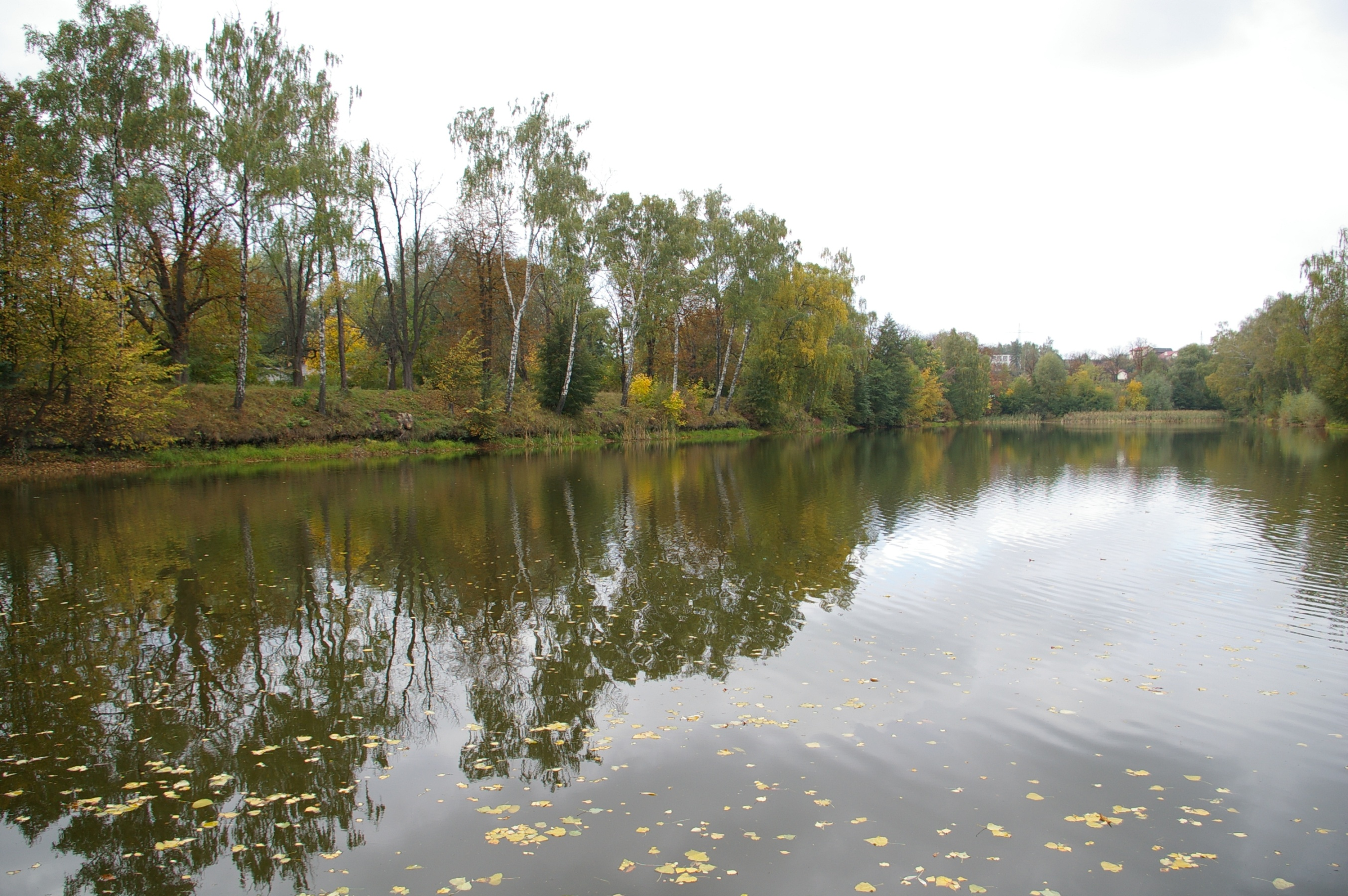 Stawy cukrownicze na Częstocicach w Ostrowcu Świętokrzyskim